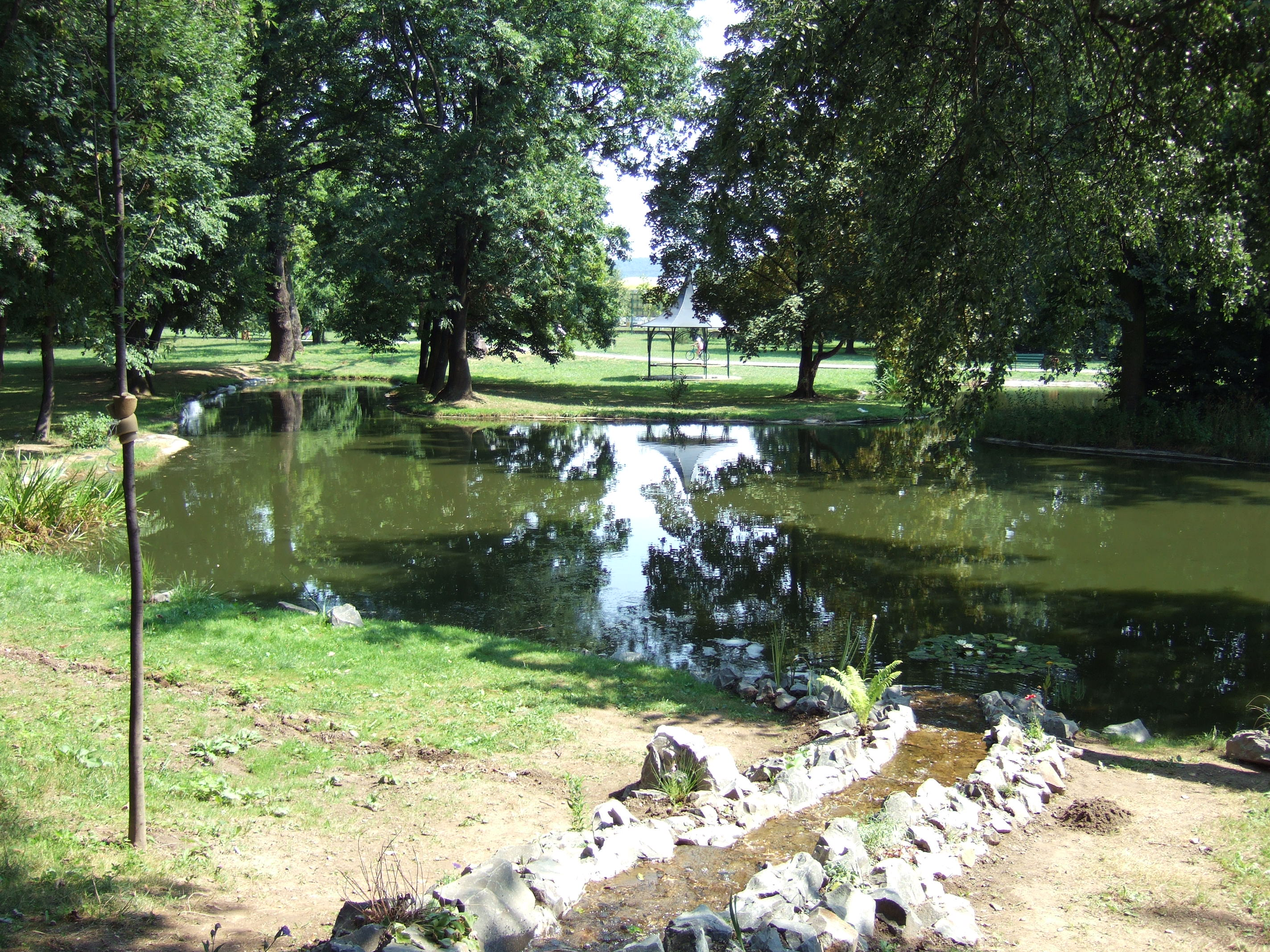 Barca‘s pond in Košice-Barca, Slovakia